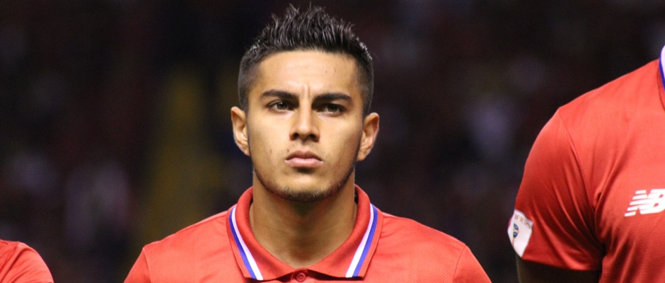 Ronald Matarrita en la Selección de Costa Rica